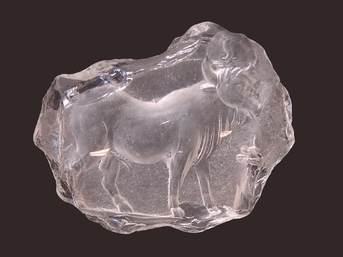 Taureau Apis, intaille sur cristal de roche (vue par transparence), élément de bijouterie gallo-romaine. Taille: environ 4 cm. Musée de Laon.